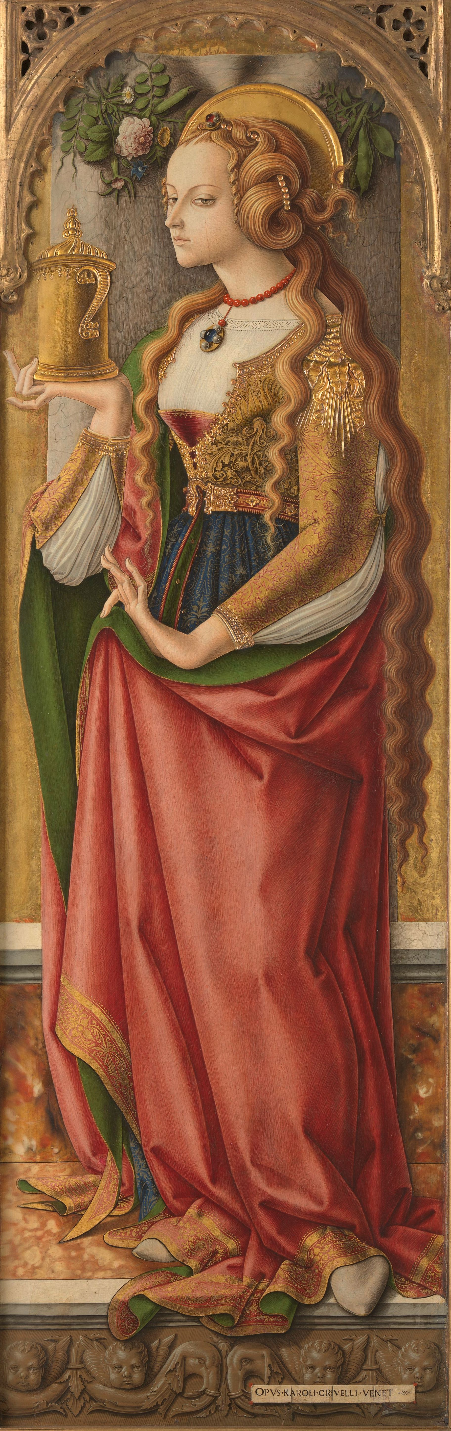 De heilige Maria Magdalena, staande met de zalfpot in de rechterhand.; Carlo Crivelli (ca. 1430–1495), Ascoli Piceno, ca. 1480, tempera op paneel